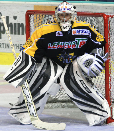 Ramón Sopko, lors du match des champions à Grenoble (perdu par Rouen contre Grenoble 1-3)